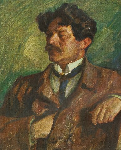 Портрет Саула Черниховского (1923)